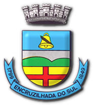 Escudo português constituído de três partes: " Na primeira faixa, em campo azul com um sino de ouro contendo uma palma verde que recorda o início do povoamento à sombra da capela sob a invocação de Santa Bárbara. " Na segunda, e campo prata um cerro verde que informa a posição do município na serra do sudeste, simplificada na silhueta do Cerro Partido. " Na terceira, em campo ouro uma cruz vermelha que indica riquezas mineralógicas do subsolo; confessa a fé dominante do seu povo e ao mesmo tempo recorda o cruzamento de estradas em busca da fronteira e do litoral, que lhe deu o nome. " Coroa mural de prata com cinco torres, indicativa de cidade sede do município listel em azul com o nome do município entre as datas 1799 e 1849. O brasão de Encruzilhada foi adotado como símbolo do município sob a lei n° 294 de 5 de outubro de 1965, no governo do Dr.Zeferino Pereira Luz.